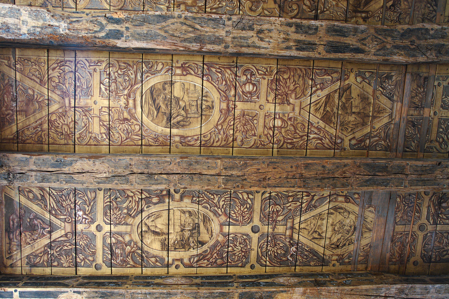 Bremen: Haus Heineken in der Sandstraße 3. Deckenmalerei von 1580, Motive „Prudentia“ (Klugheit: Spiegel, Schlange), „Justitia“ (Gerechtigkeit: Schwert, Waage), „Dialectica“ (Dialektik bzw. Logik, eine der sieben Freien Künste, Frau mit Zählgestus und Büchern) und „Temperantia“ (Mäßigkeit, eine der vier antiken Kardinaltugenden, Frau gießt Wasser in den Wein.